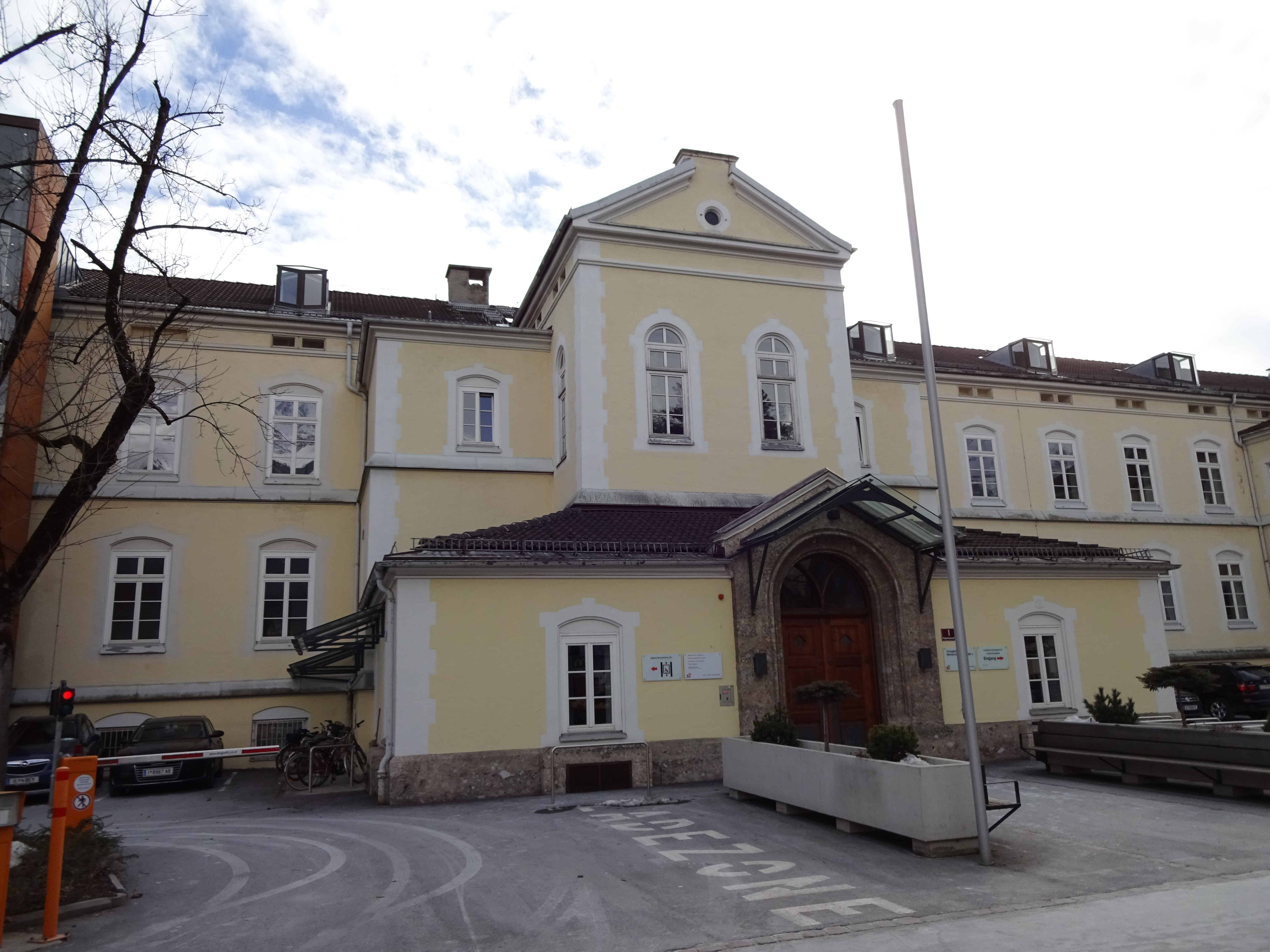 Tiroler Landesarchiv, ehemalige Landes-Gebärklinik, erbaut 1887-1890 nach Plänen von Josef von Stadl This media shows the remarkable cultural object in the Austrian state of Tyrol listed by the Tyrolean Art Cadastre with the ID 68511. (on tirisMaps, on tirisdienste.at, pdf, more images on Commons)